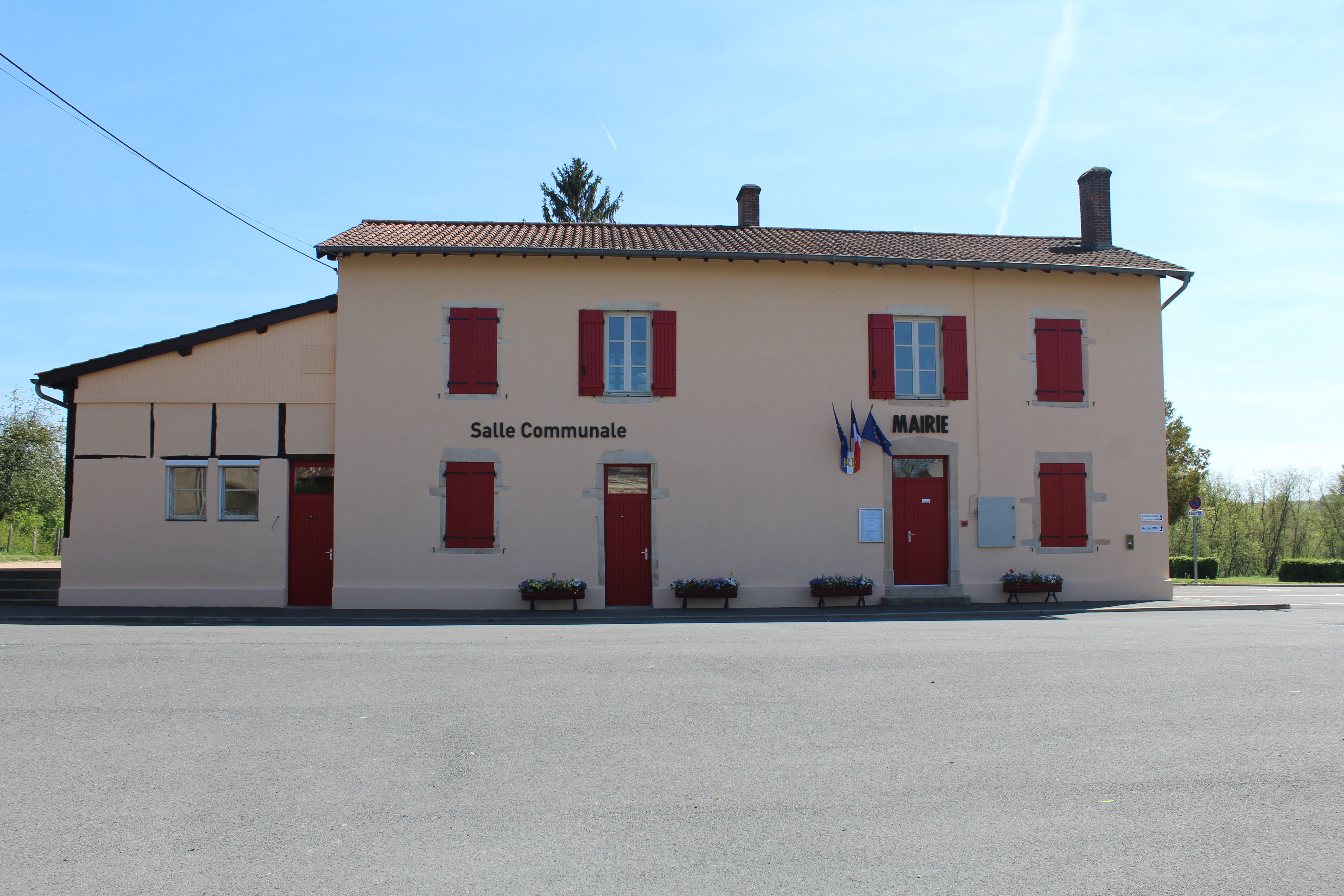 Mairie d'Arbigny.